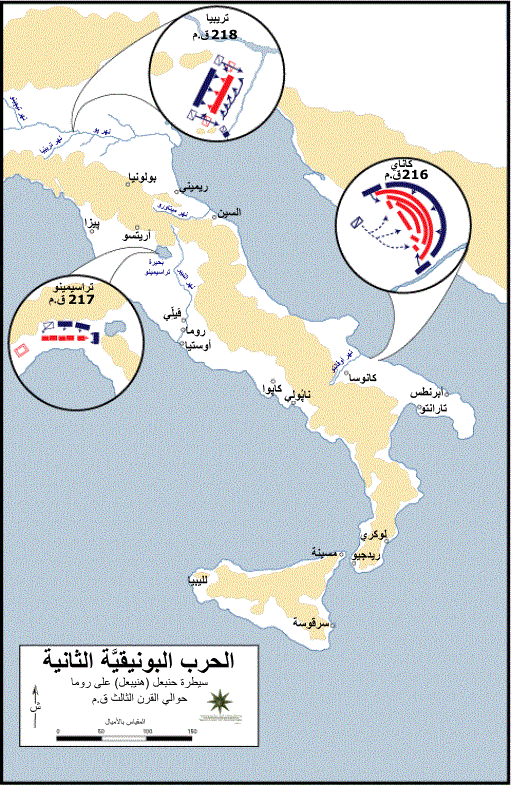 الحرب البونيقيَّة الثانية: حنبعل (هنيبعل) يُبسط سيطرته على روما.